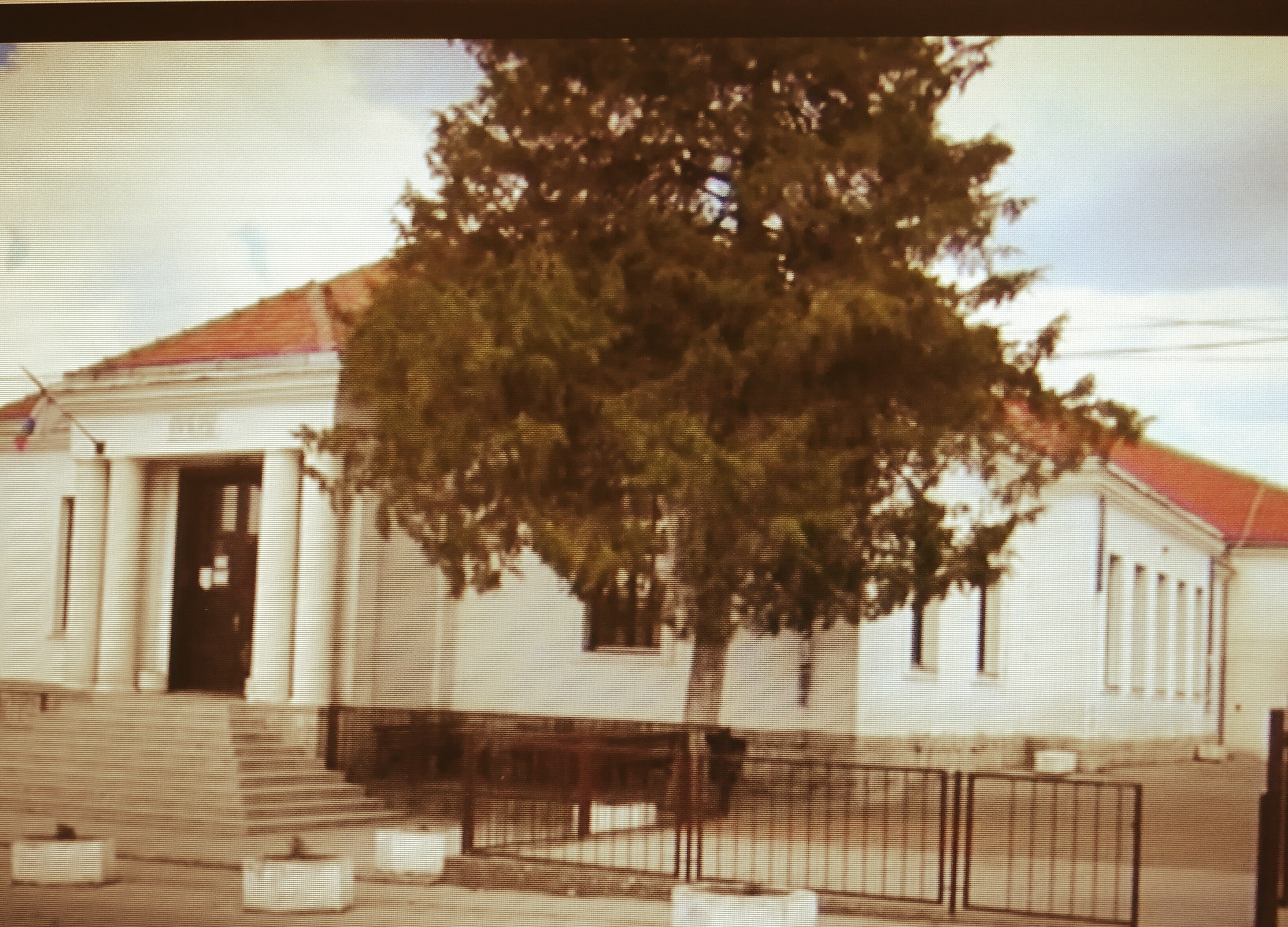 Srpski (latinica): Osnovna skola Karadjordje Topola